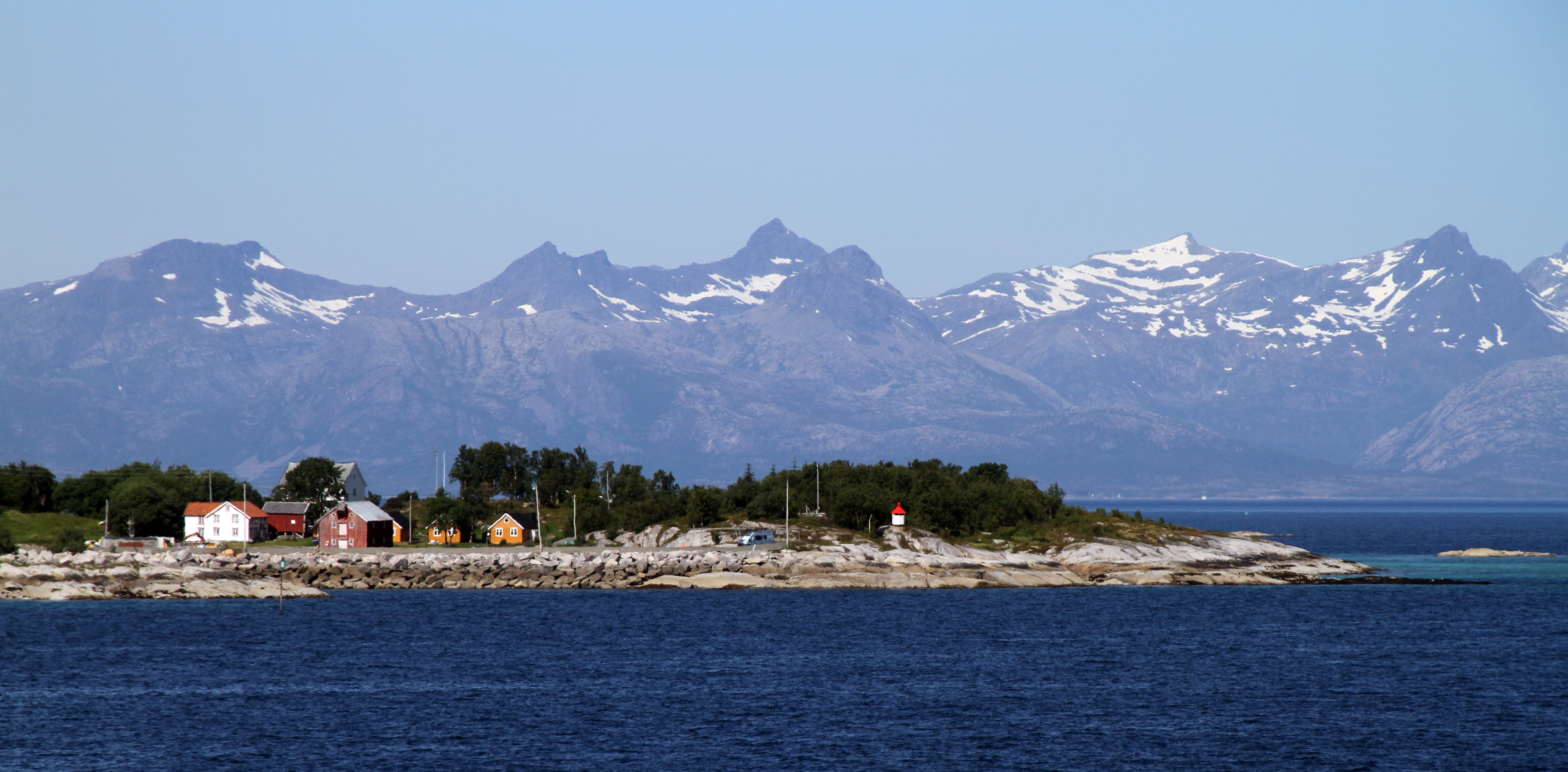 Korsnes, Nordland, Norwegen